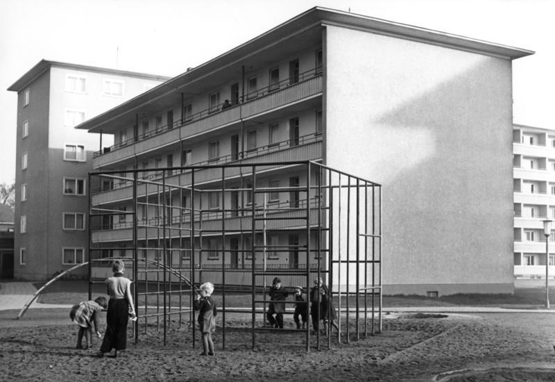 Dezember 1954 Stegerwald-Siedlung für Flüchtlinge in Köln-Mülheim